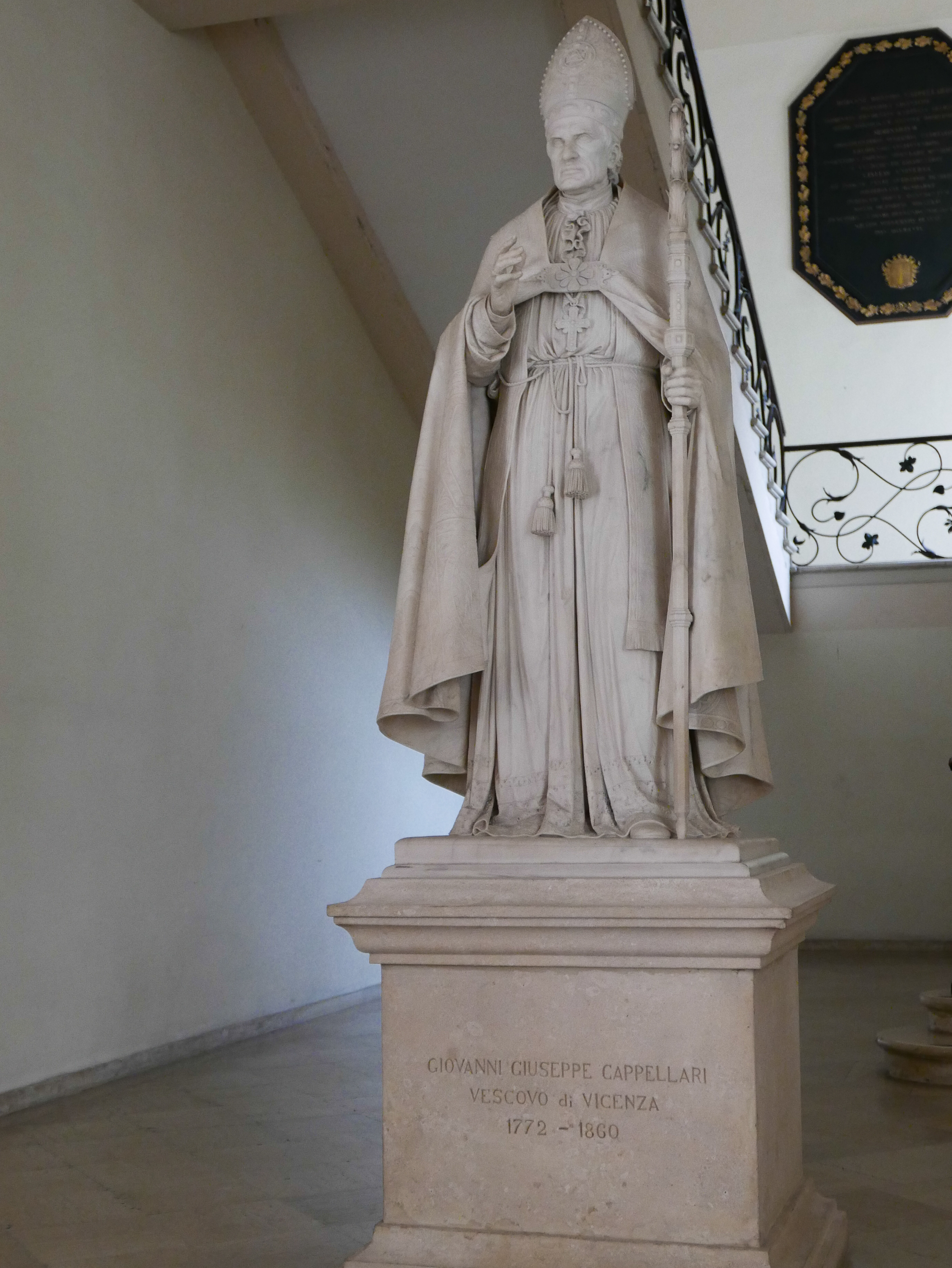 Seminario vescovile di Vicenza